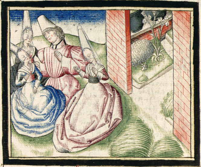 ChampionDesDames-Grenoble-Ms0352